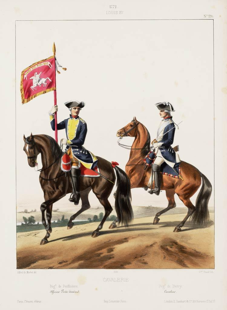 1772. Louis XV. Cavalerie: Rég.t de Penthièvre, Officier Porte étendard; Rég.t de Berry; Cavaliertratto da: "Costumes militaires francais depuis 1439 jusqu'en 1789 / A. de Marbot" Gambart, Junin & Co